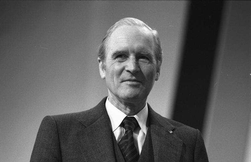 26. Bundesparteitag der CDU in der Friedrich-Ebert-Halle in Ludwigshafen 23.-25.10.1978